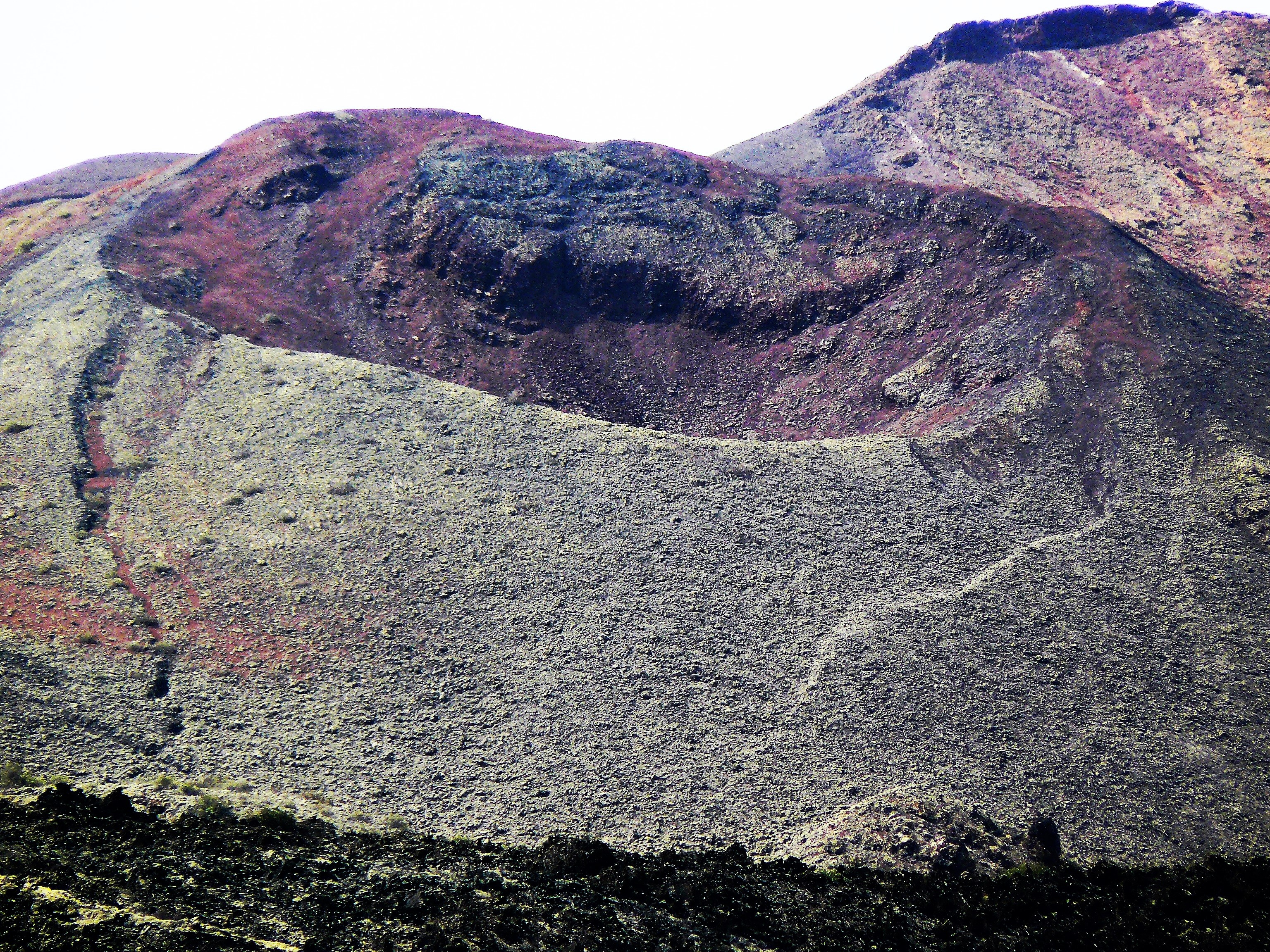 Parque Nacional de Timanfaya This is a photography of a Site of Community Importance in Spain with the ID: ES0000141. Natura2000 entry, EEA entry